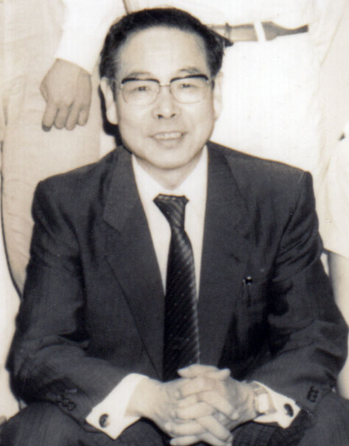 1990年の静岡県磐田市の醍醐荘で行われた仮説実験授業入門講座での記念撮影。